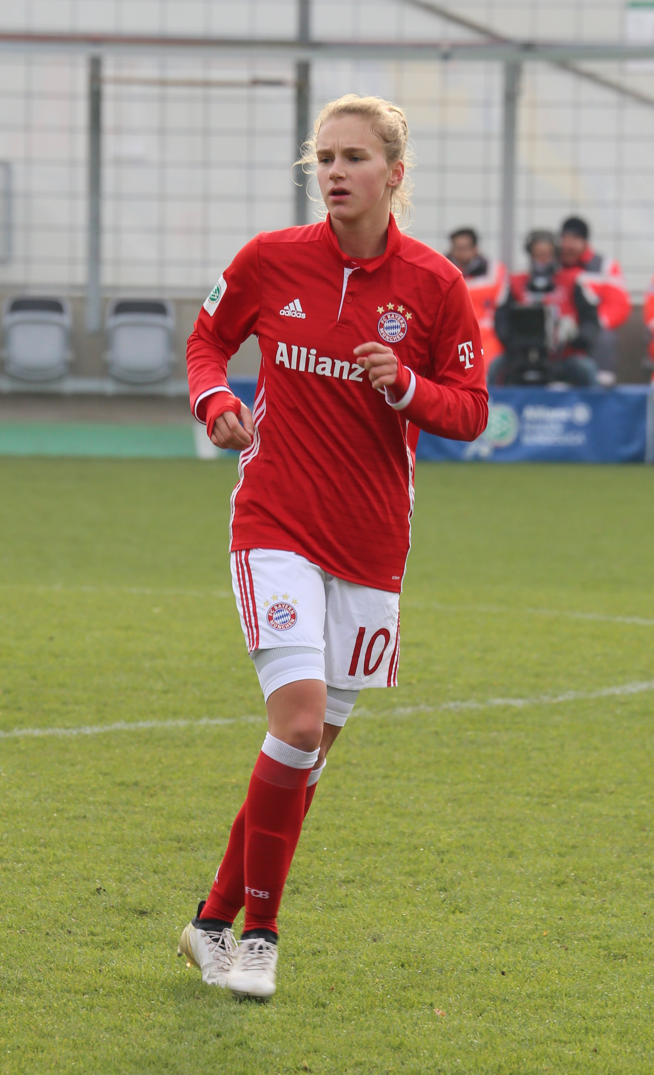 Vivianne Miedema (FC Bayern München) beim Aufwärmen vor demFrauen-Bundesliga-Spiel FC Bayern München gegen 1. FFC Frankfurt am 13. November 2016 im Stadion an der Grünwalder Straße, München (Ergebnis war 1:0).